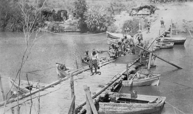 גשר דמייה עליו חצו חיילי הבריגדה הני-זילנדית את הירדן בדרך לא-סאלט